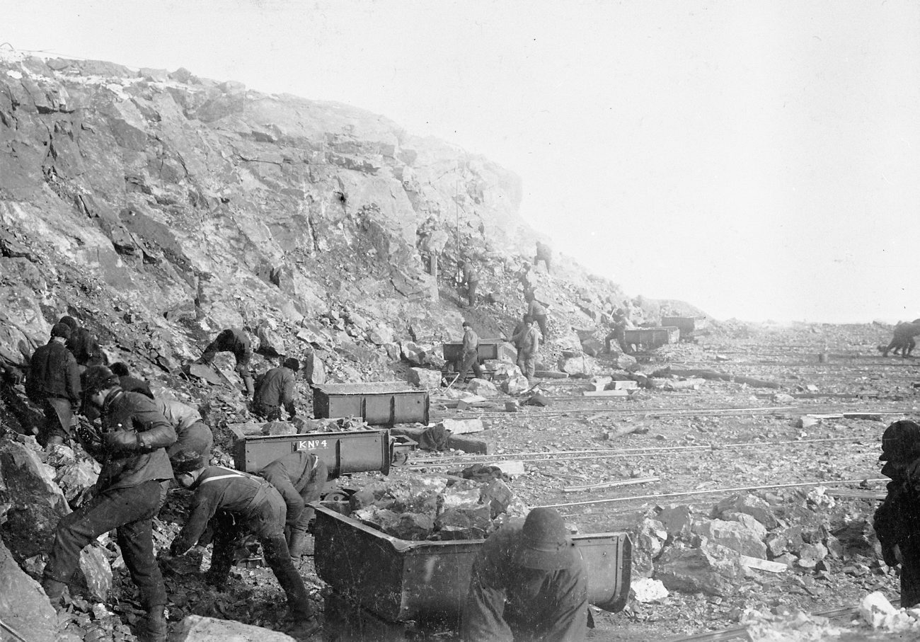 C16476. Malmbrytning i Kiruna. Fotografiet är skänkt till Tekniska museet från Svenska Turistföreningen.